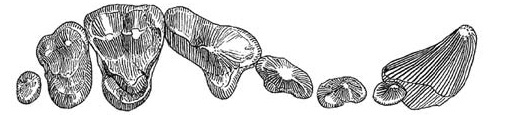 Daphoenodon falkenbachi, upper dentition (modified from Hunt 2002; upper teeth reversed).